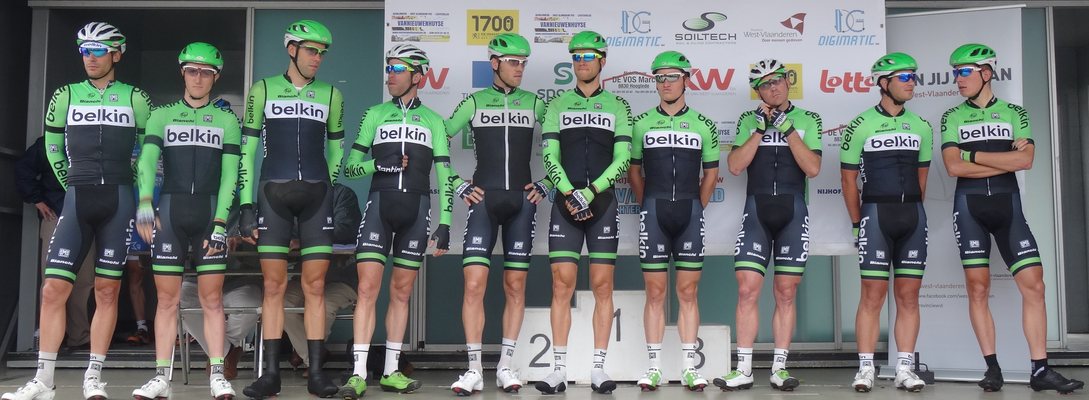 Reportage photographique réalisé le mercredi 24 septembre à l'occasion du départ et du début de la course du Circuit du Houtland 2014 à Lichtervelde, Belgique.